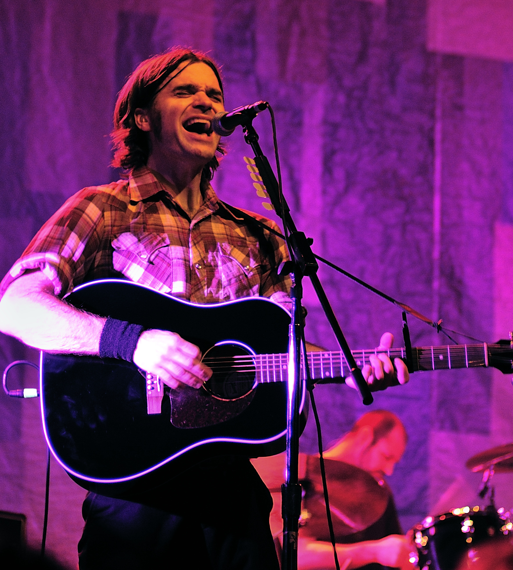 Death Cab for Cutie in München 21.11.2008